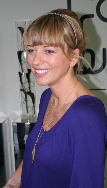 Sara Cox